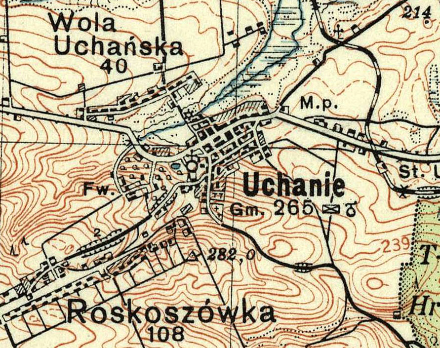 Wojskowa mapa okolic Uchań z 1933, wydawca Wojskowy Instytut Geograficzny, typ IV, wzór 1931, siatka QS co 2 km, południk zerowy Greenwich, 4-kolorowa (treść podstawowa - czarny, wody - niebieski, lasy - zielony, warstwice - brązowy), kolory dodatkowe: czerwony - szlaki turystyczne, fioletowy - cieniowanie.